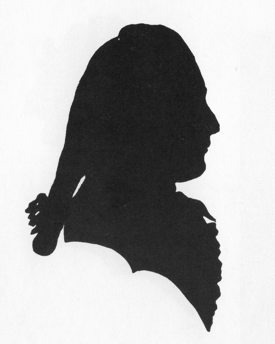 Bernhard Albrecht Moll (1743–1788): Mutmassliches Selbstporträt. Royal Ontario Museum, Toronto.